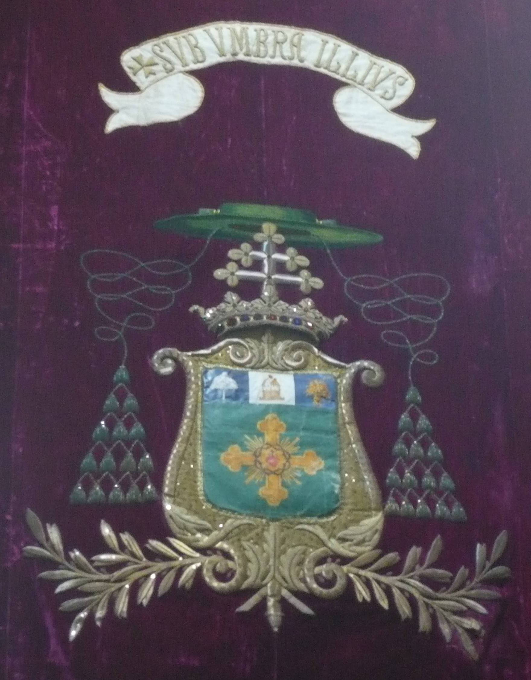 Armoiries du cardinal Jules Saliège, archevêque de Toulouse de 1928 à 1956, sur sa tenture épiscopale exposée en 2010 dans la cathédrale de Toulouse.